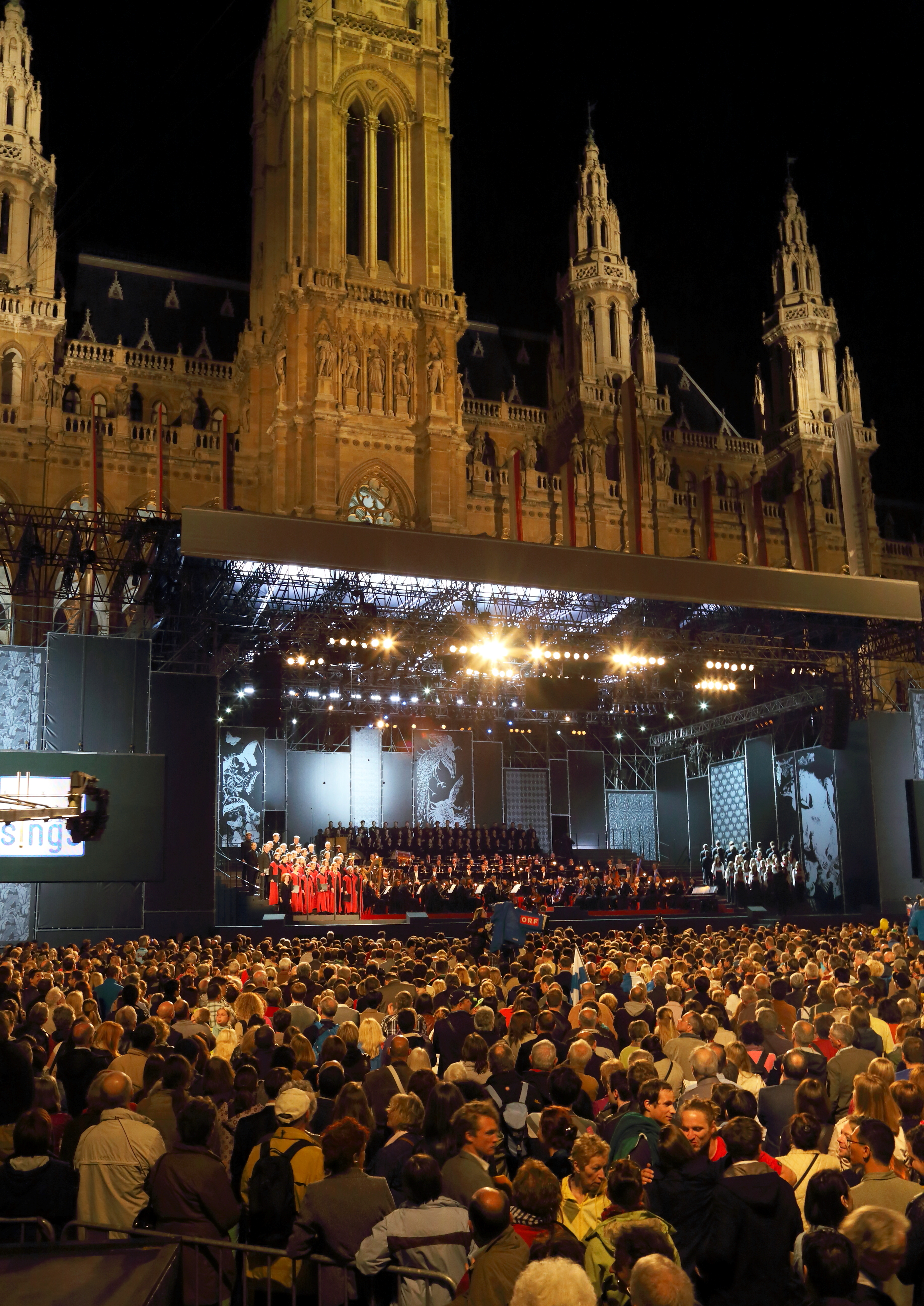 Eröffnungsveranstaltung der Wiener Festwochen 2014 am 9. Mai mit dem Arnold Schoenberg Chor und dem Radio-Symphonieorchester Wien unter der Leitung von Cornelius Meister. An Gastchören nahmen teil: BNR Mixed Coir aus Bulgarien, Concordia Discors aus Kroatien, coro siamo aus Österreich, Euga aus Finnland, La Maîtrise de Paris aus Frankreich, Liepaites aus Litauen, Sola aus Lettland und Vox Bona aus Deutschland. Die Moderatoren Cornelius Obonya und Alice Tumler führten durch die Veranstaltung.